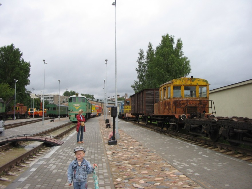 Dzelzceļa muzejs